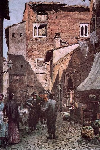 Case dei Pierleoni in Rome (rione Ripa)